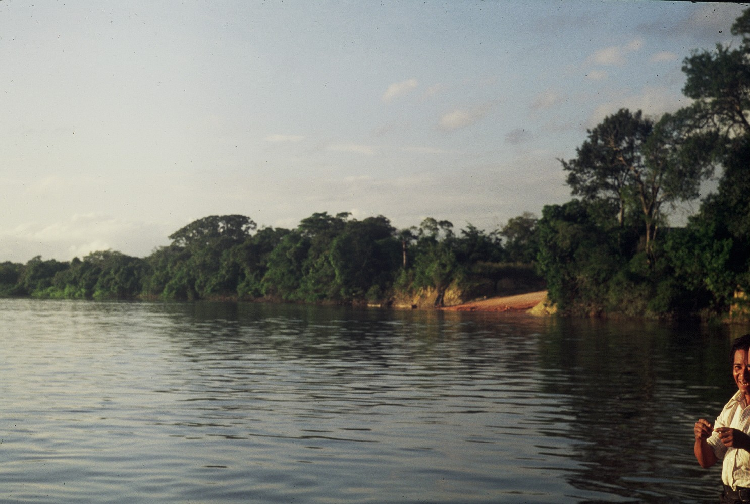 Río Caura cerca de Maripa, donde antiguamente se cruzaba mediante una chalana o ferry. Autor: Fev. Fecha: 14/12/1979